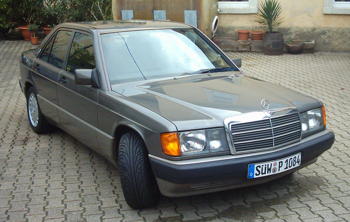 Mercedes-Benz 190 E (MOPF), Baujahr 1993 Fotograf / Zeichner: Bastian Kuhn Andere Versionen: (für die GNU FDL)